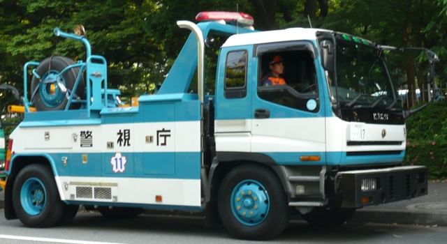 レッカー車。警視庁機動隊観閲式にて撮影。